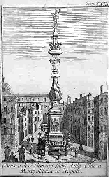 "Obelisco di San Gennaro fuori della Chiesa Metropolitana in Napoli".